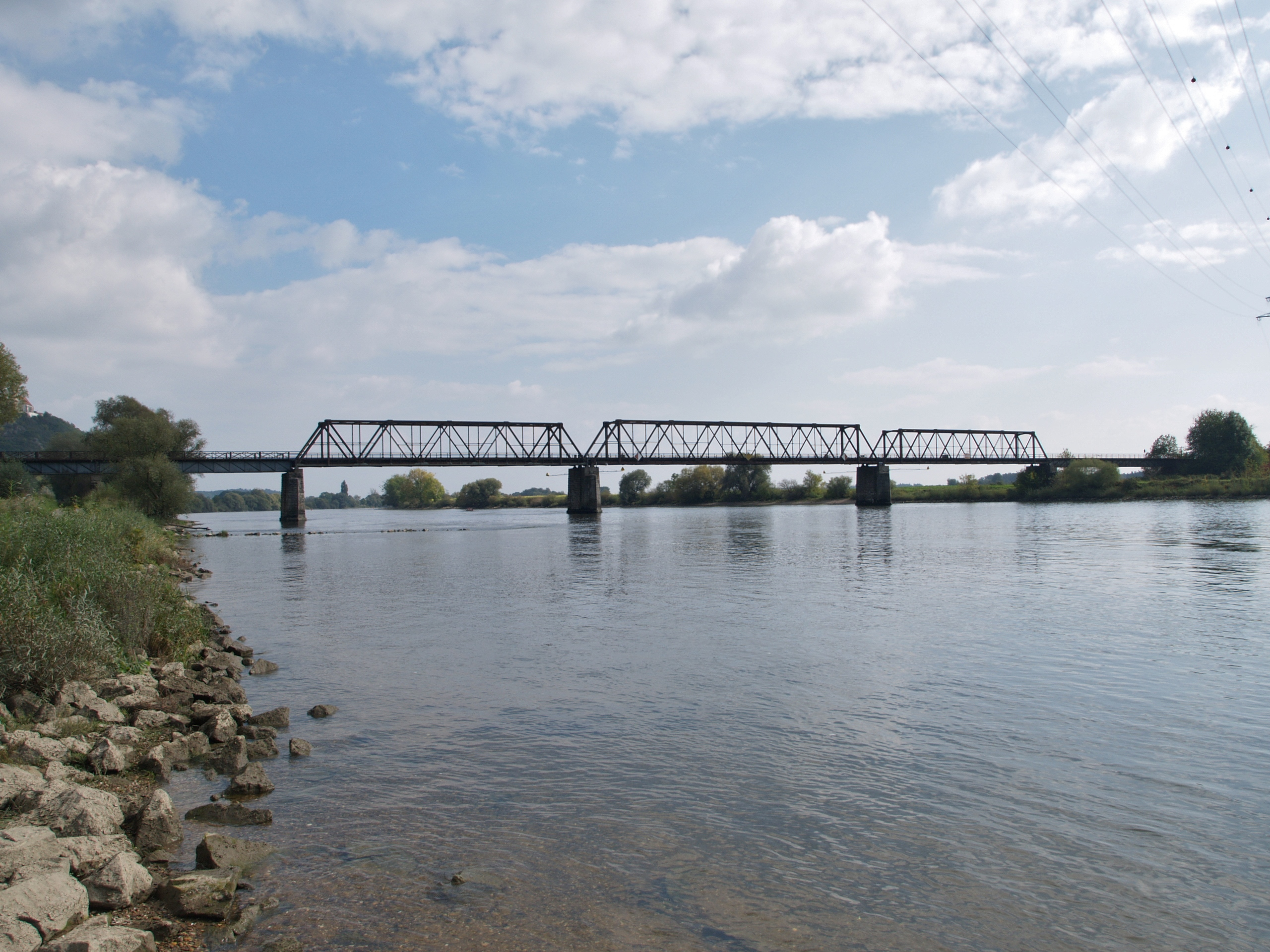 Eisenbahnbrücke Bogen